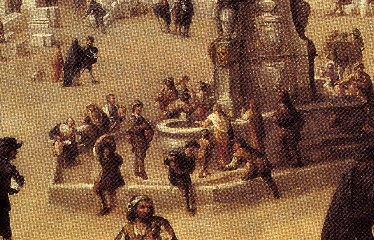 Oleo anónimo titulado “Milagro de la Virgen de Atocha en las obras de construcción de la Casa de la Villa” (1676-1700). Detalle de los aguadores de Madrid llenando sus cántaros en la fuente monumental de Rutilio Gaci, instalada en la plaza en 1618, con sus mascarones y escudos bellamente esculpidos. El cuadro incluye escenas anecdóticas como la rotura de uno de esos cántaros ante la alarma de uno de los aguadores.